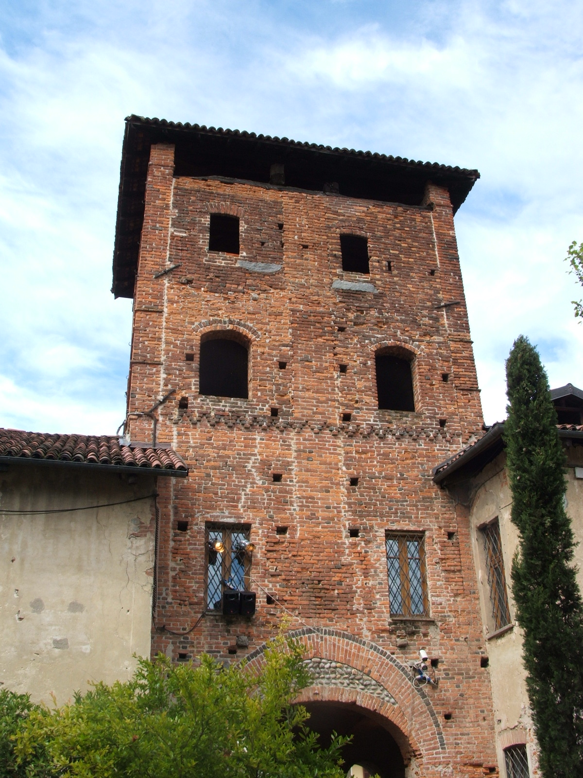 Ricetto di Candelo, provincia di Biella, Piemonte, Italia